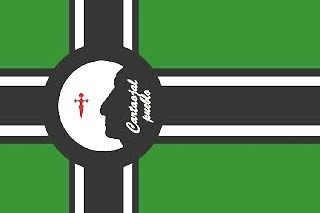 Bandera no oficial de Cartaojal, creada por José Angel López Pozo para su uso como bandera de esta pedanía de Antequera. Se puede conocer más sobre su creación en la siguiente web [1]